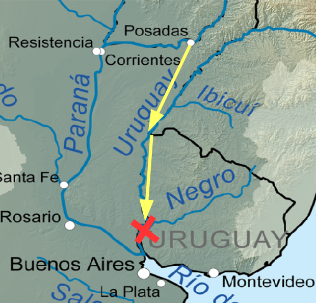 Ruta del vuelo 2553 de Austral, accidentado el 10 de octubre de 1997.